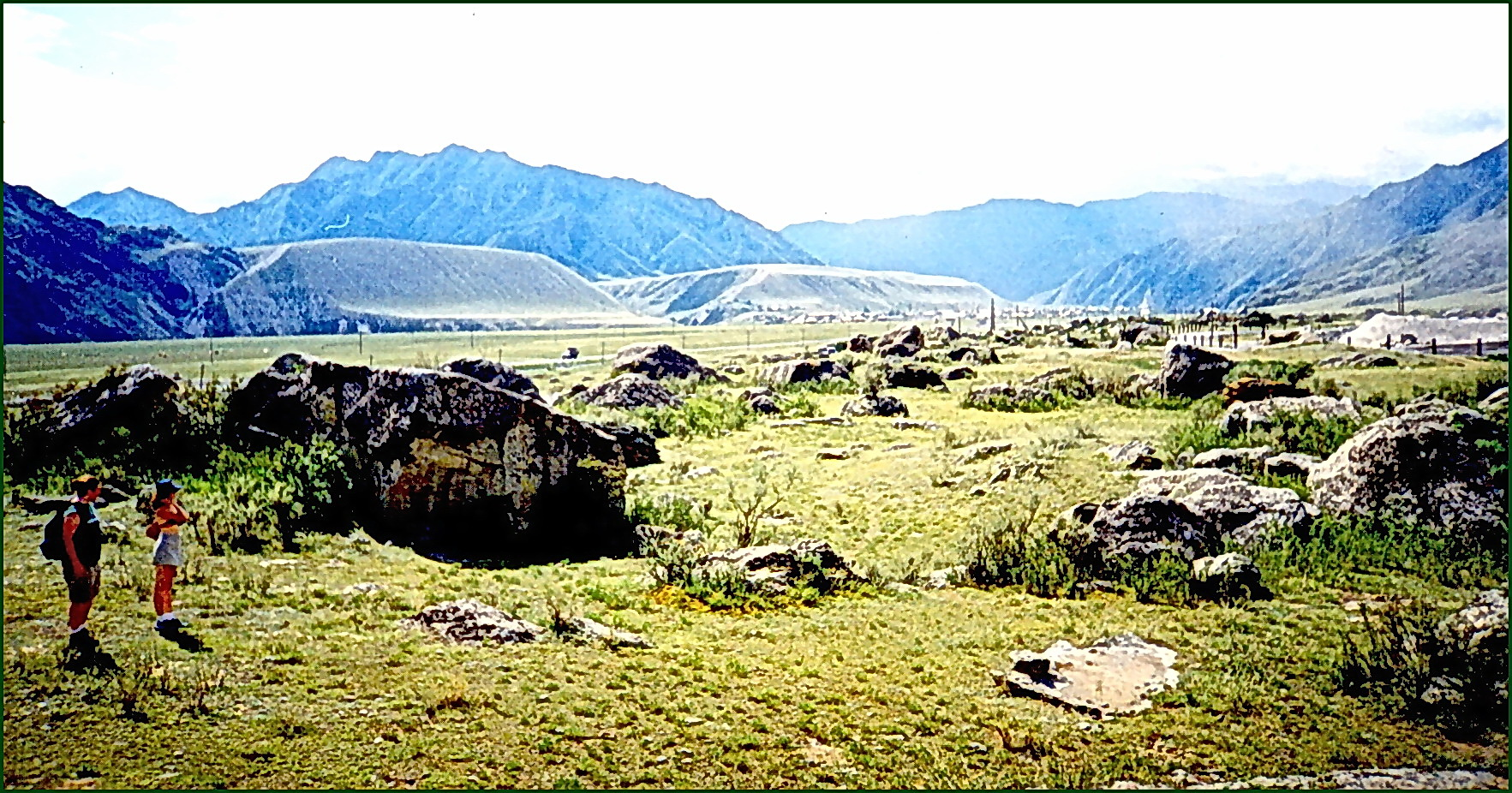 Дилювиальная берма ("каменный сад") на поверхности условно 100-метроовой террасы р. Катунь. На заднем плане - дилювиальные террасы устьевой части р. Ини, Горный Алтай.